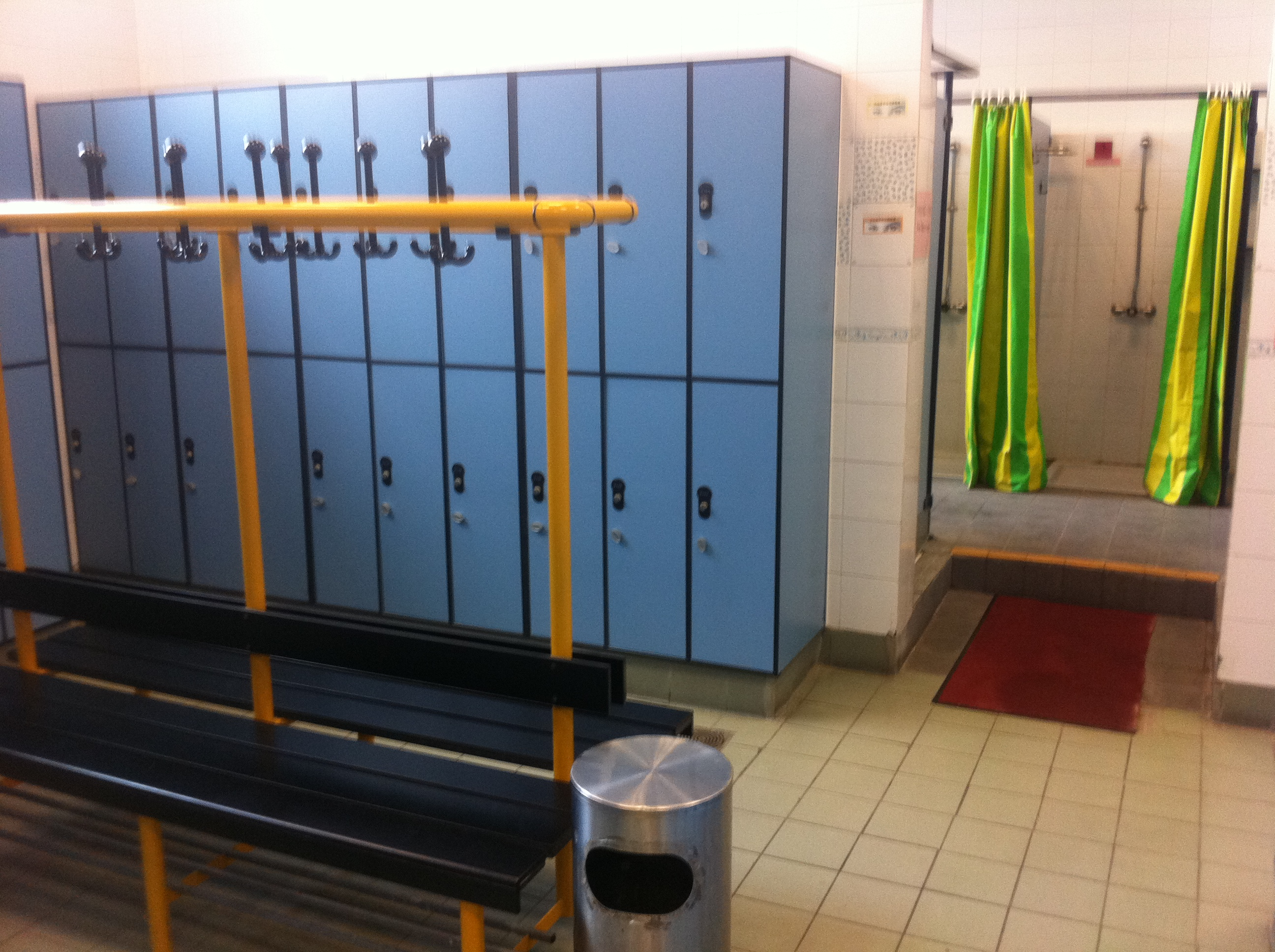 中文（香港）: 堅尼地城 士美非路市政大廈zh:更衣室